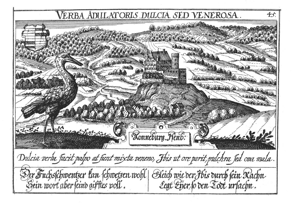 Ansicht der Ronneburg in Hessen (wohl nach einer älteren Vorlage) nach D. Meisner/E. Kieser, Thesaurus Philopoliticus oder Politisches Schatzkästlein Bd. 2, Faksimile-Neudruck der Ausgabe Frankfurt/Main 1625-1626 u. 1627-1631, Nördlingen 1992, Buch 7, Nr. 45.